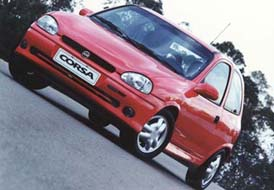 Corsa GSi 1995